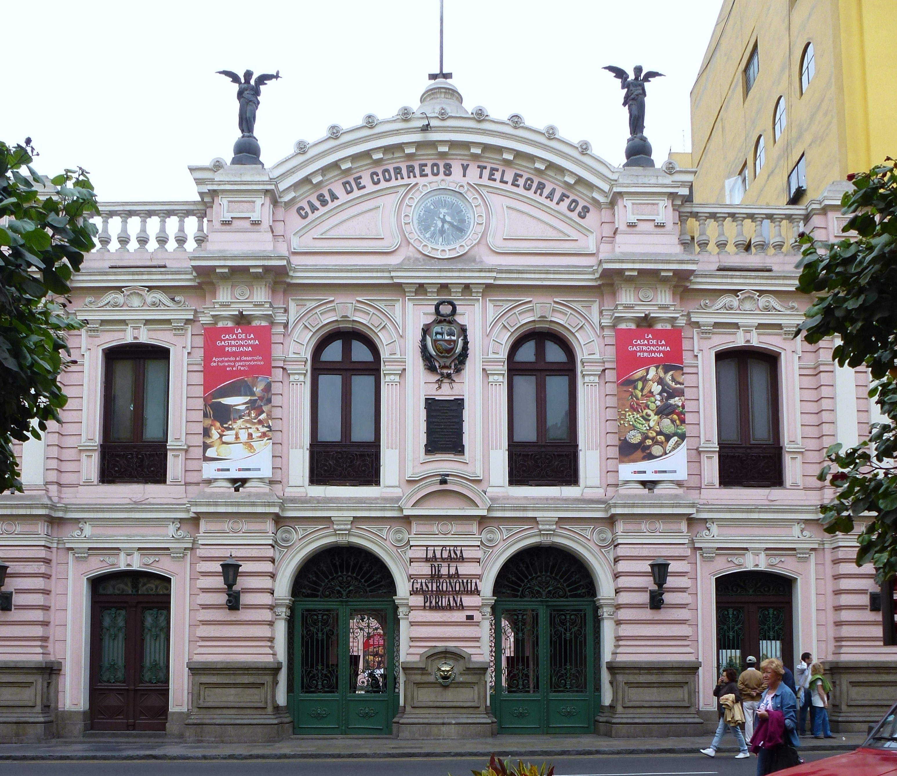 Lima Pérou